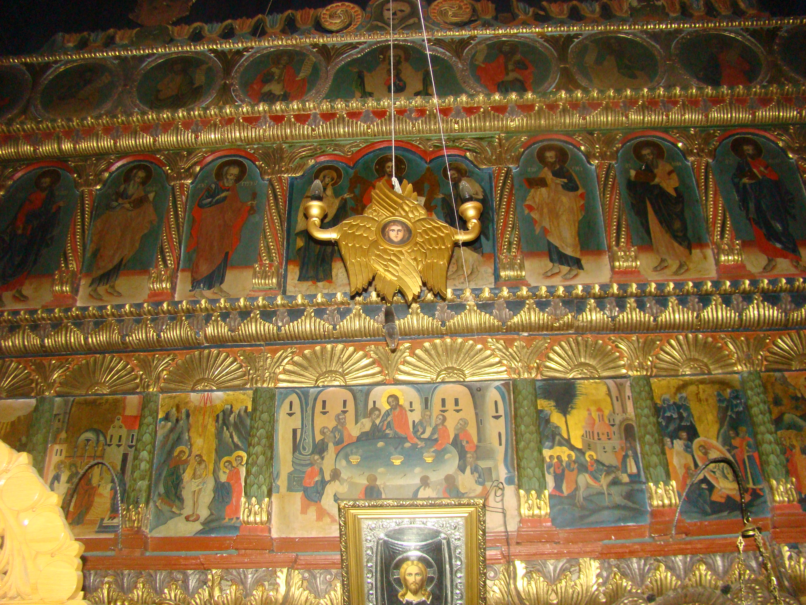 Schitul Valea Neagră, Vrancea